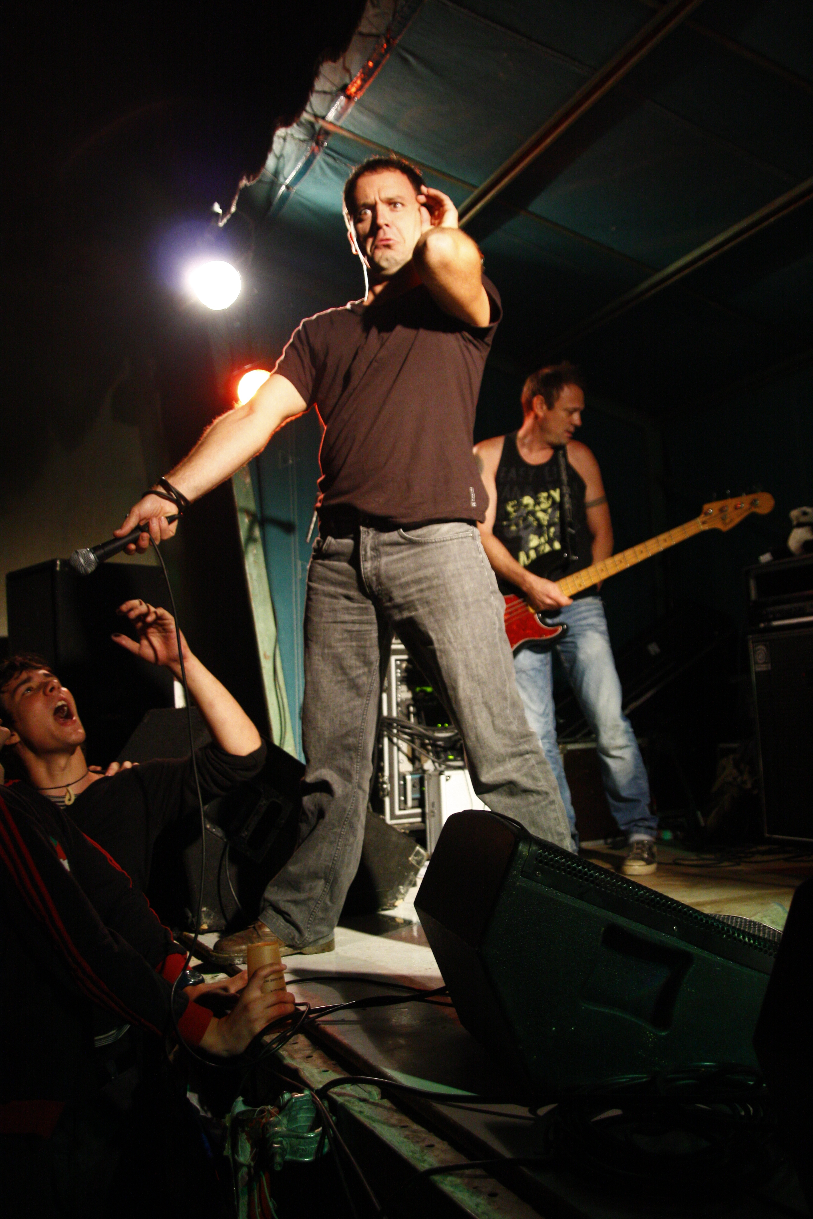 Lendakaris Muertos taldeko Aitor "Ibarretxe" abeslaria.